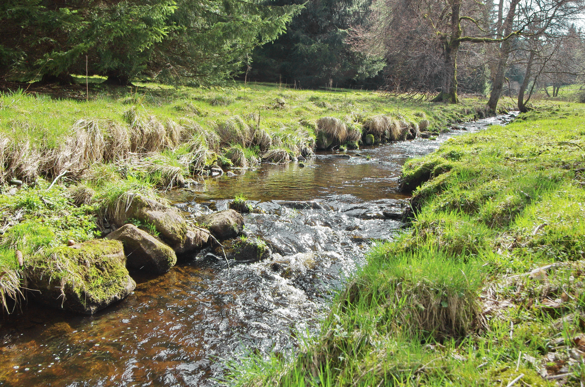 Pramenský potok pod osadou Kladská, okres Cheb